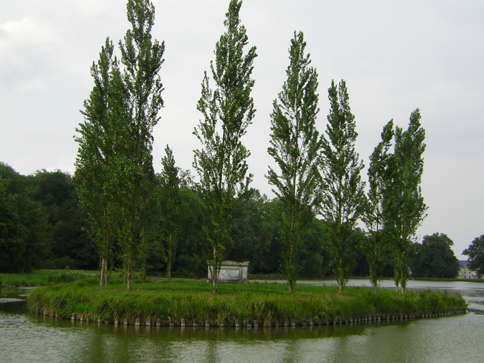 Ermenonville. Ile des peupliers. Cénotaphe de Jean-Jacques Rousseau